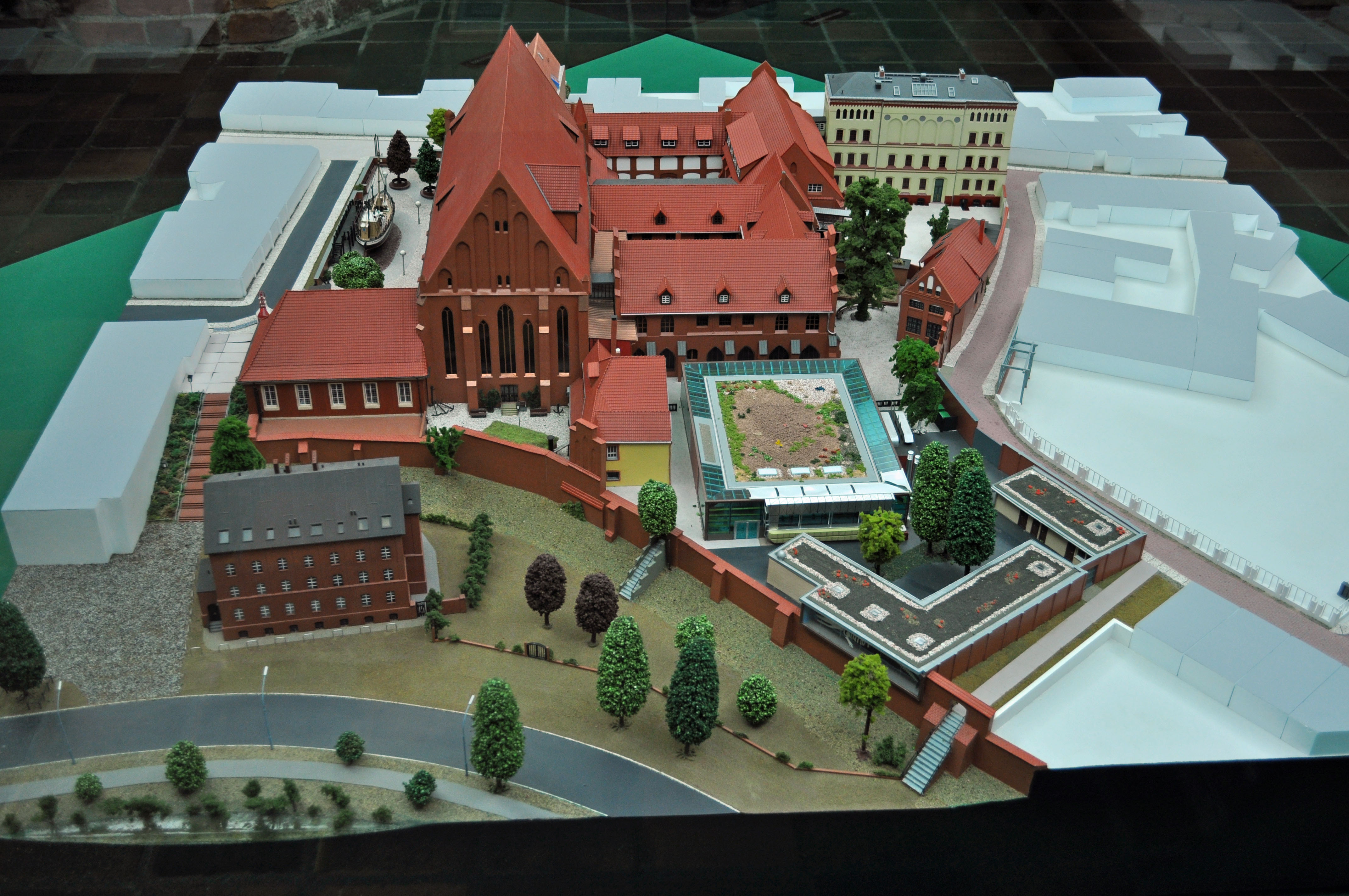 Im Meeresmuseum Stralsund. Das Deutsche Meeresmuseum ist in der ehemaligen Katharinenkirche untergebracht.